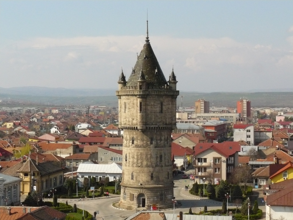 Castelul de apă